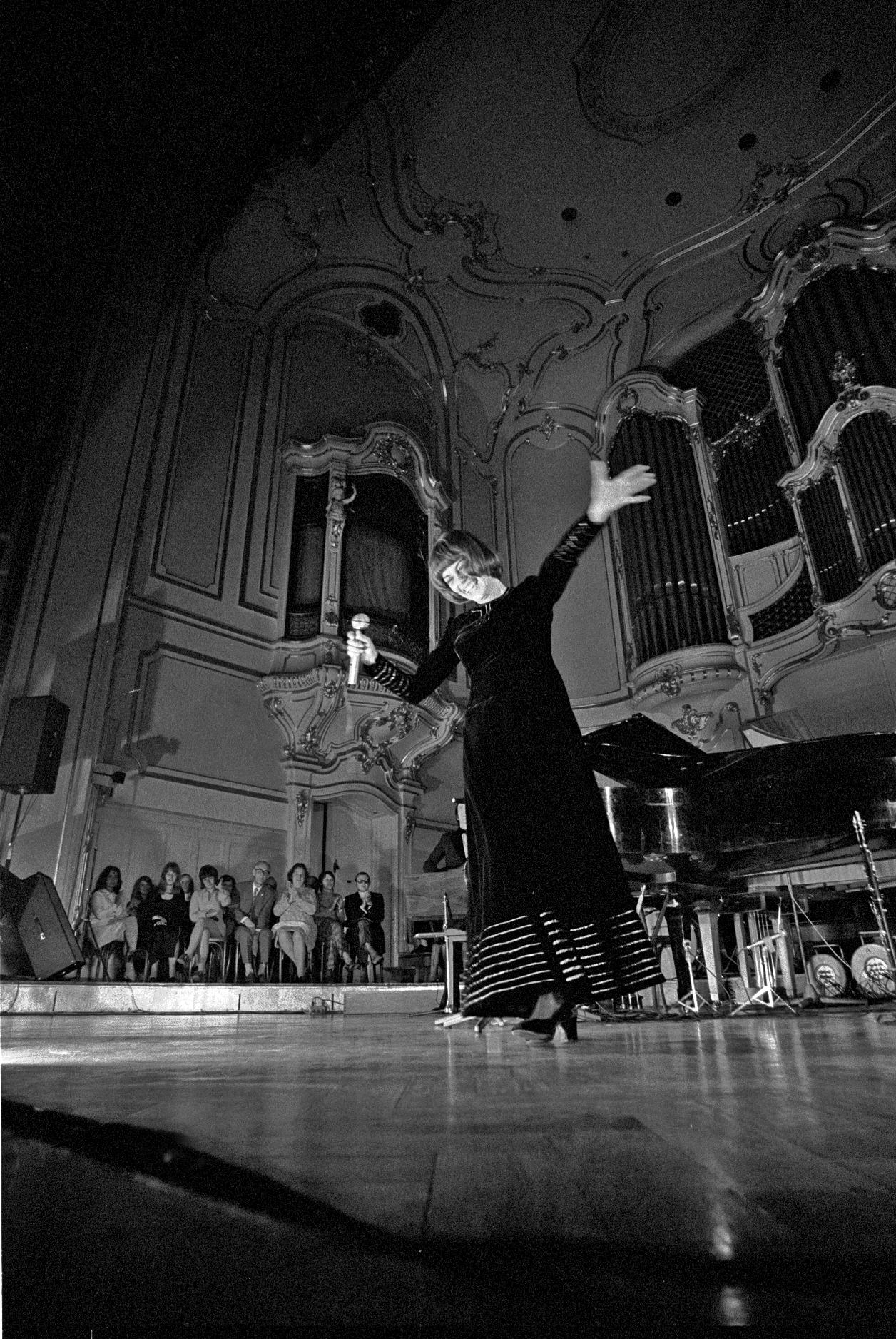 Mireille Mathieu in der Musikhalle Hamburg, 1971.